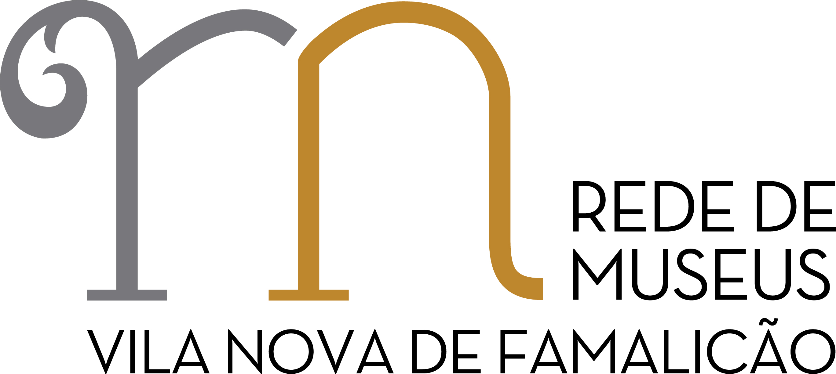 Logótipo Rede de Museus de Vila Nova de Famalicão